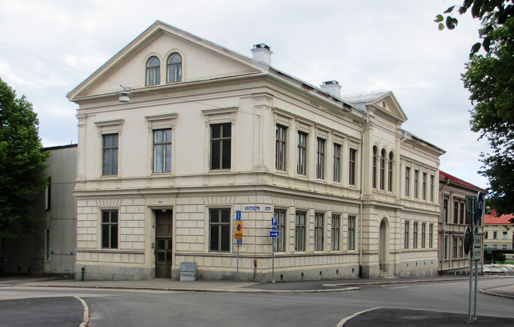 Gamla posten på Kyrkogatan 19 i Söderhamn. Ursprungligen Helsinglands enskilda bank. Genomgripande ombyggnad efter brand 1876-77 enligt Ernst Jacobssons ritningar